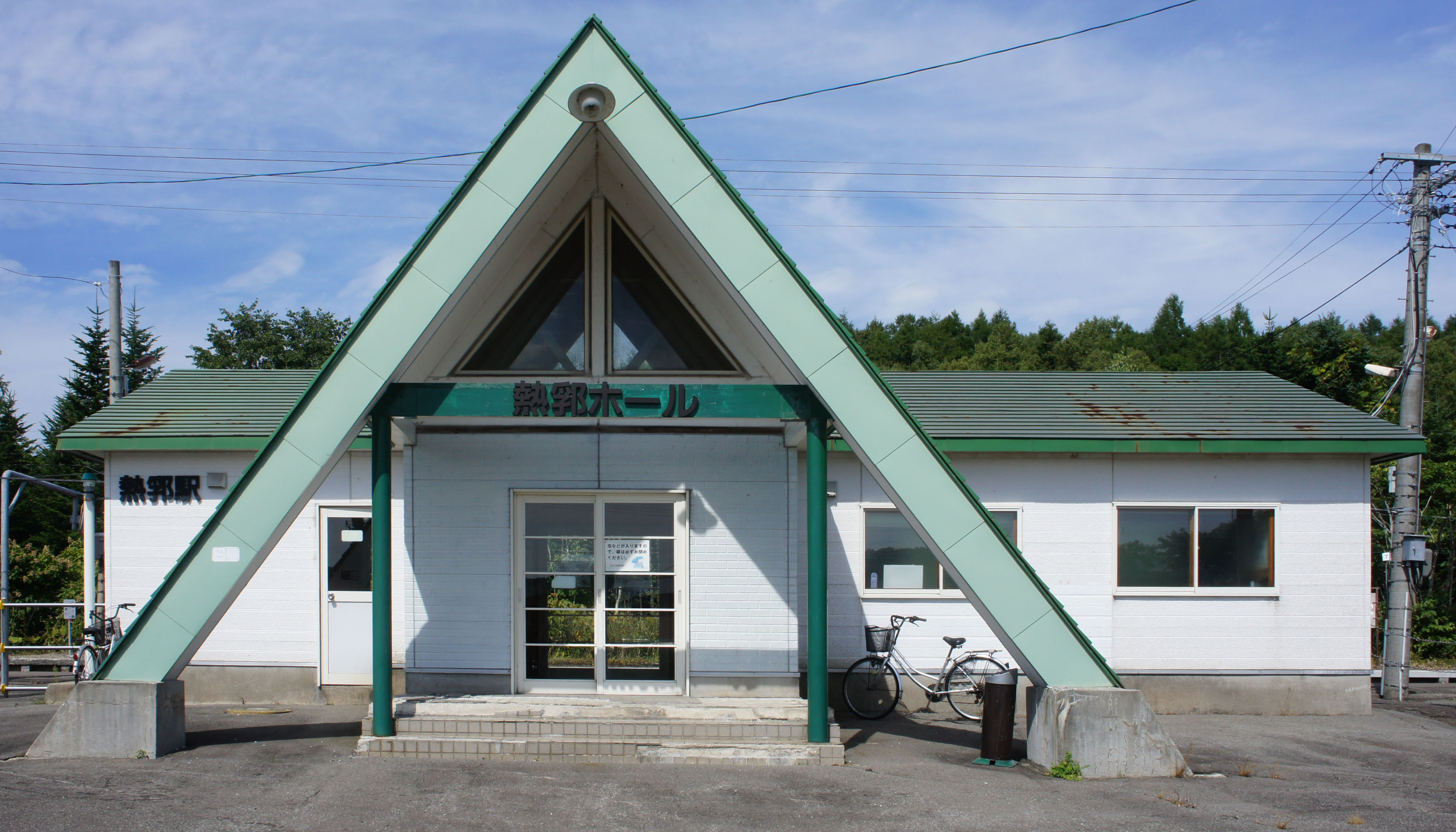 JR函館本線・熱郛駅の駅舎 Sony NEX-3